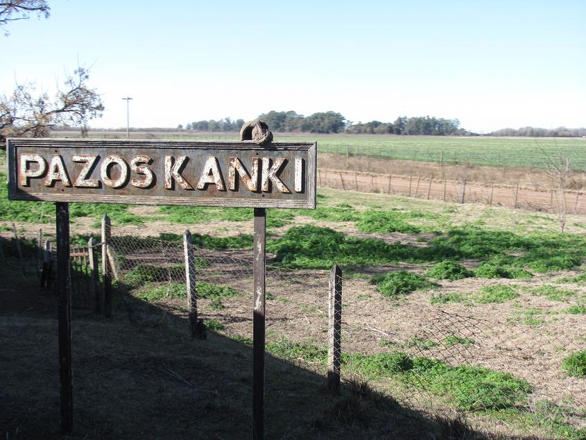 Estación Pasos Kanki, Buenos Aires.